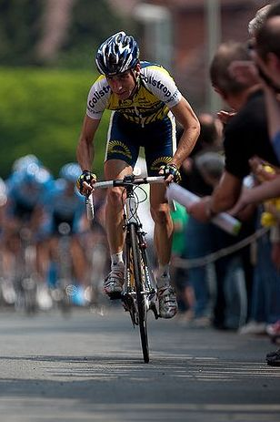 Reinier Honig, Eschborn-Frankfurt City Loop 2009